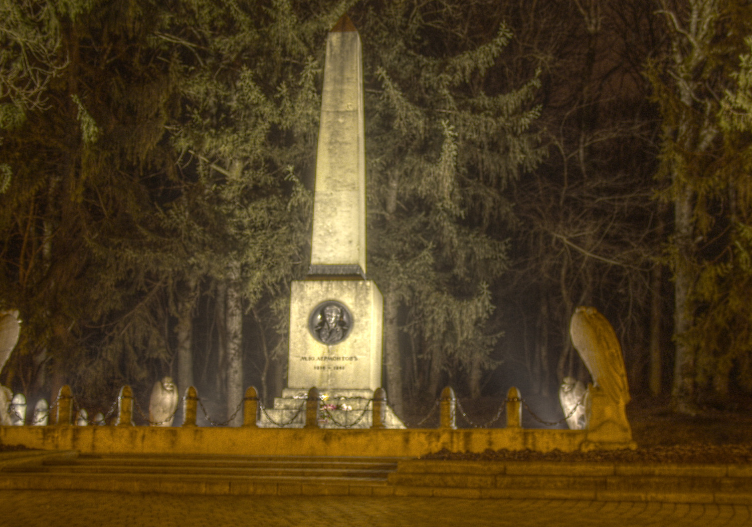 Обелиск ночью. Место, где в 1841 г. состоялась дуэль поэта Лермонтова М.Ю. Обелиск: гора Машук, склон, Пятигорск, Ставропольский край